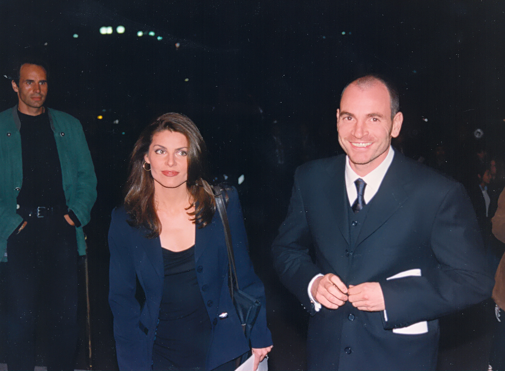 Andrea Molina y Alvaro Rudolphy; Presentadores FIC; año: 1998